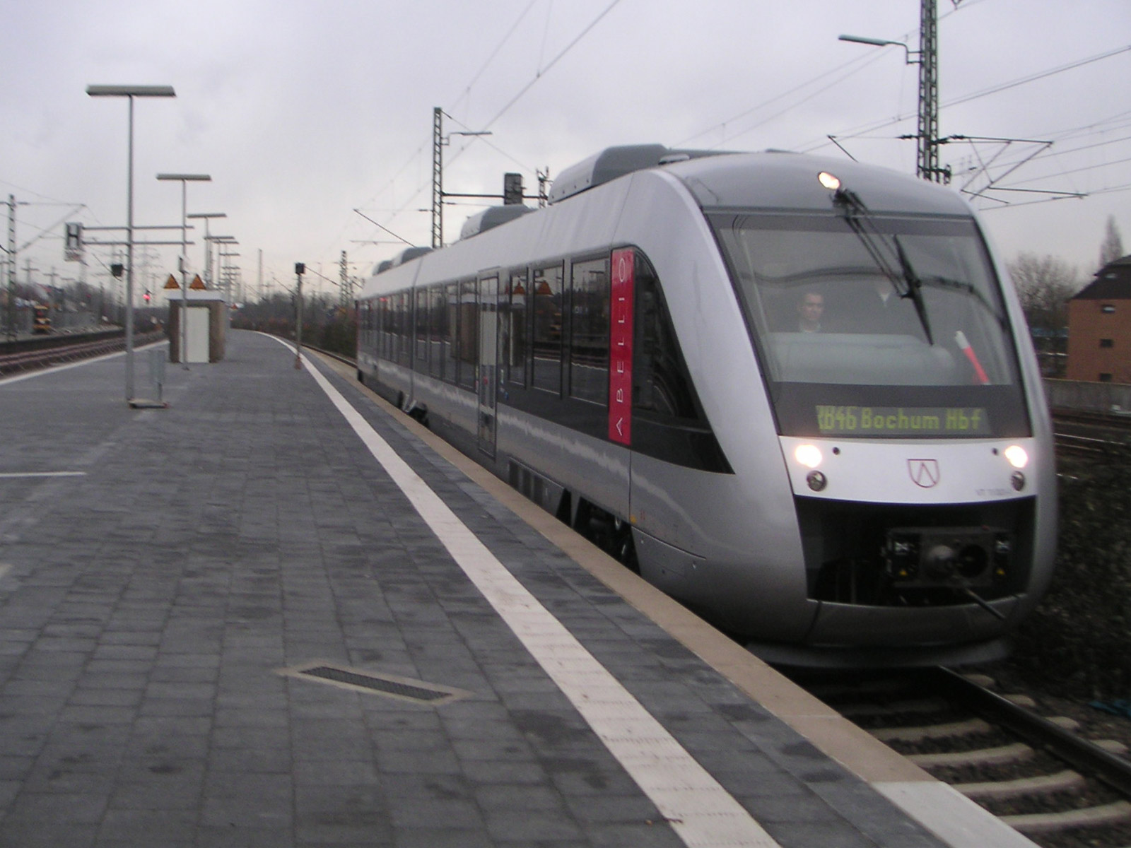 Beschreibung: Gelsenkirchen Hbf: Ein Triebwagen der Linie RB 46 - Nokia Bahn, die zwischen Gelsenkirchen und Bochum verkehrt und seit 2005 von ABELLIO betrieben wird. Description: A train of the line RB 46 - Nokia Bahn at Gelsenkirchen. Quelle/Source: Fotografiert am 13. Dezember 2005 Fotograf: Marc Schuelper